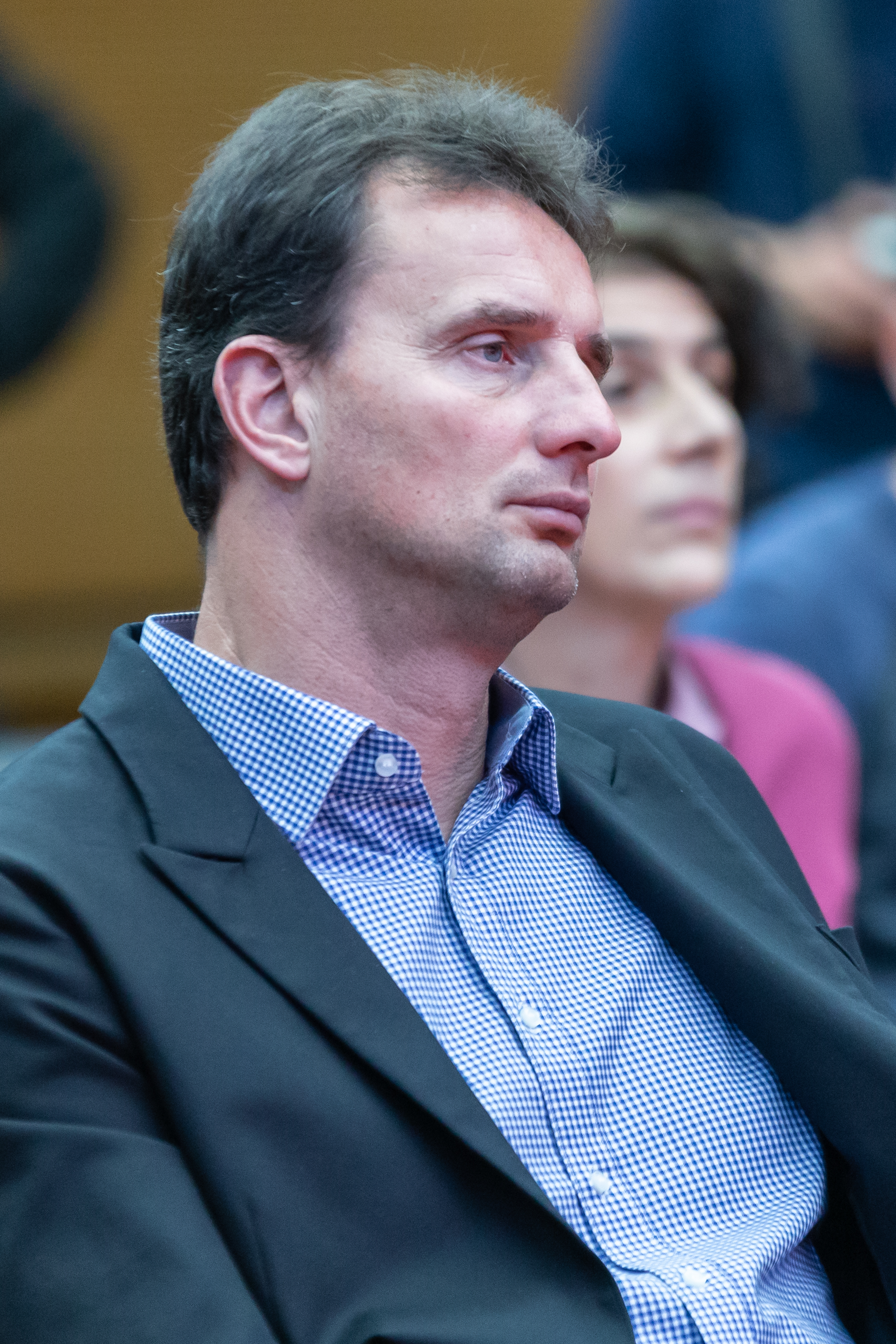 Michael Fuchs, Torwarttrainer der Frauen-Nationalmannschaft